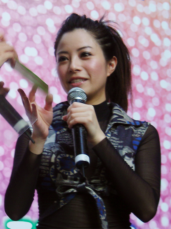 歌手徐懷鈺出席「Badgirl Yuki」專輯簽唱會